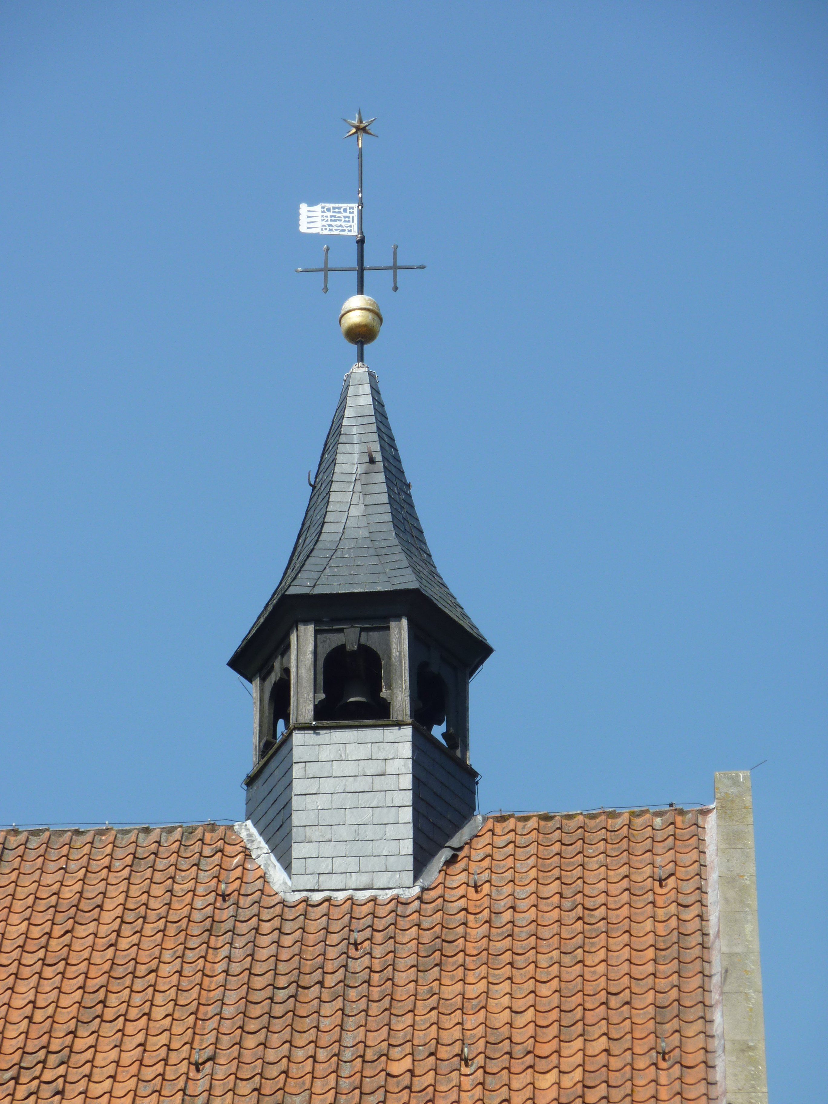 Dachreiter der Johanneskirche in Bad Zwischenahn